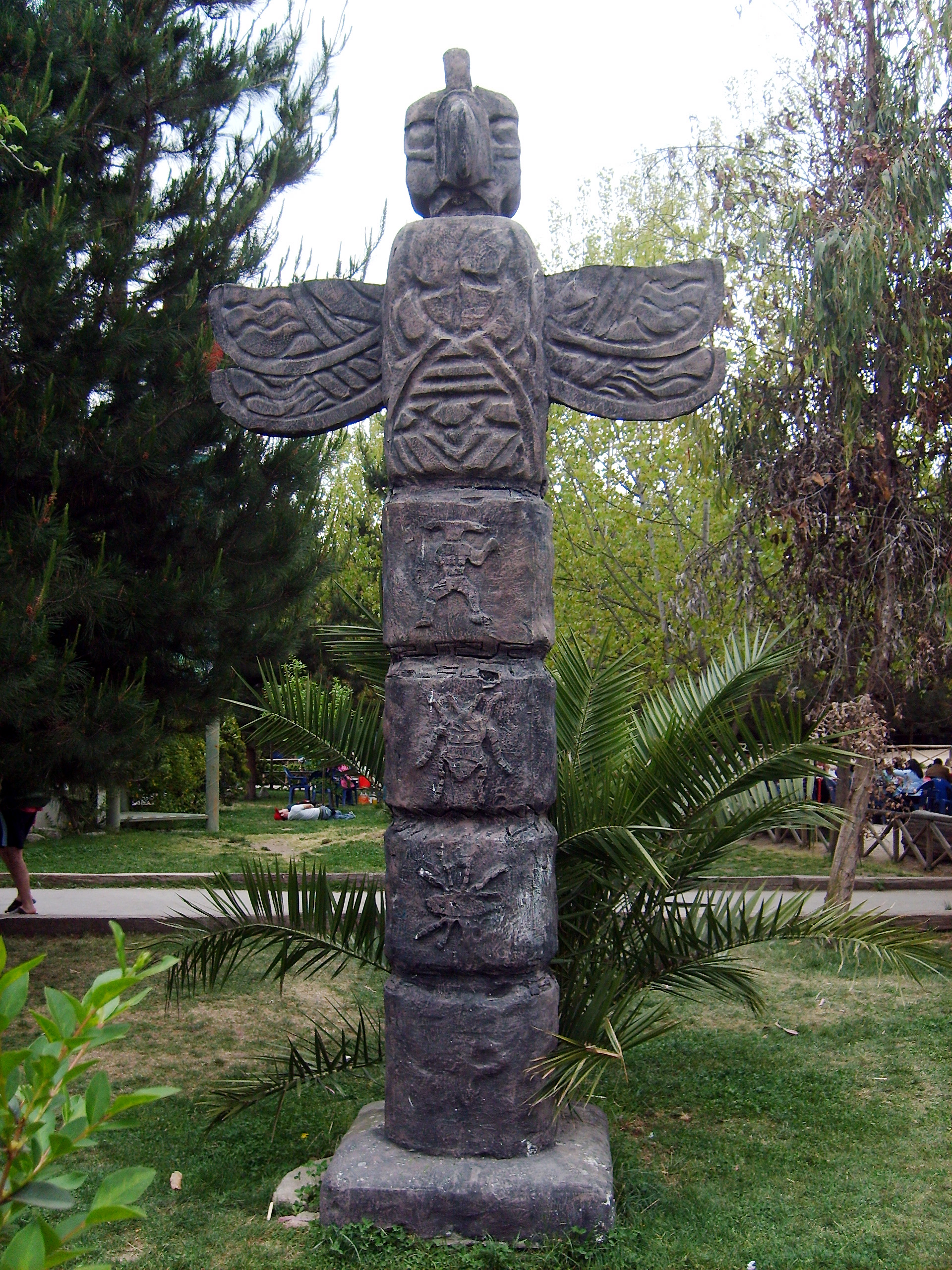 Tótem de madera ubicado en uno de los parque al interior del zoológico BuinZoo en Chile.